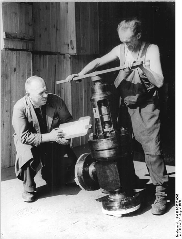 Zentralbild-Biscan 5.8.59 Neue Armaturen für Hochdrucksynthese entwickelt Das volkseigene Meßgeräte- und Armaturenwerk "Karl Marx" in Magdeburg hat große Aufgaben im Kohle- und Energieprogramm, in der Entwicklung der chemischen Industrie und auch beim Bau von Atomkraftwerken. Im Jahre 1959 wird das Werk seine Produktion von Armaturen für die Hochdrucksynthese auf 250% steigern. Diese Armaturen, die das Werk als einziger Betrieb in der DDR baut, sind für höchste Temperaturen und Drücke bestimmt. Durch Rekonstruktion alter bewährter Typen wurden jetzt neue Armaturen geschaffen, die dem neuesten Stand der Technik entsprechen und mit dem höchsten Gütezeichen der DDR ausgezeichnet wurden. UBz.: Der dreifache Aktivist Walter Haenschke (links) Werkmeister im Versand und Heinz Droz prüfen das Typenschild eines Eckventils für die Benzin-Hochdruck-Synthese. Solche Ventile werden nicht nur für den Bedarf der Chemieindustrie der DDR, sondern auch für den Export in die Sowjetunion und in die CSSR hergestellt.